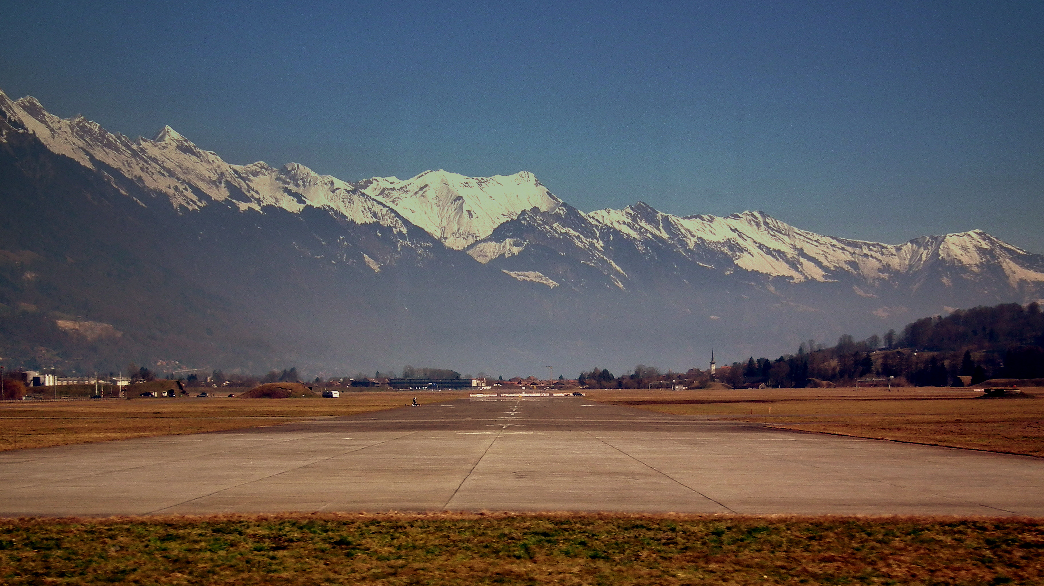 INTERLAKEN AIRPORT SWITZERLAND MARCH 2011